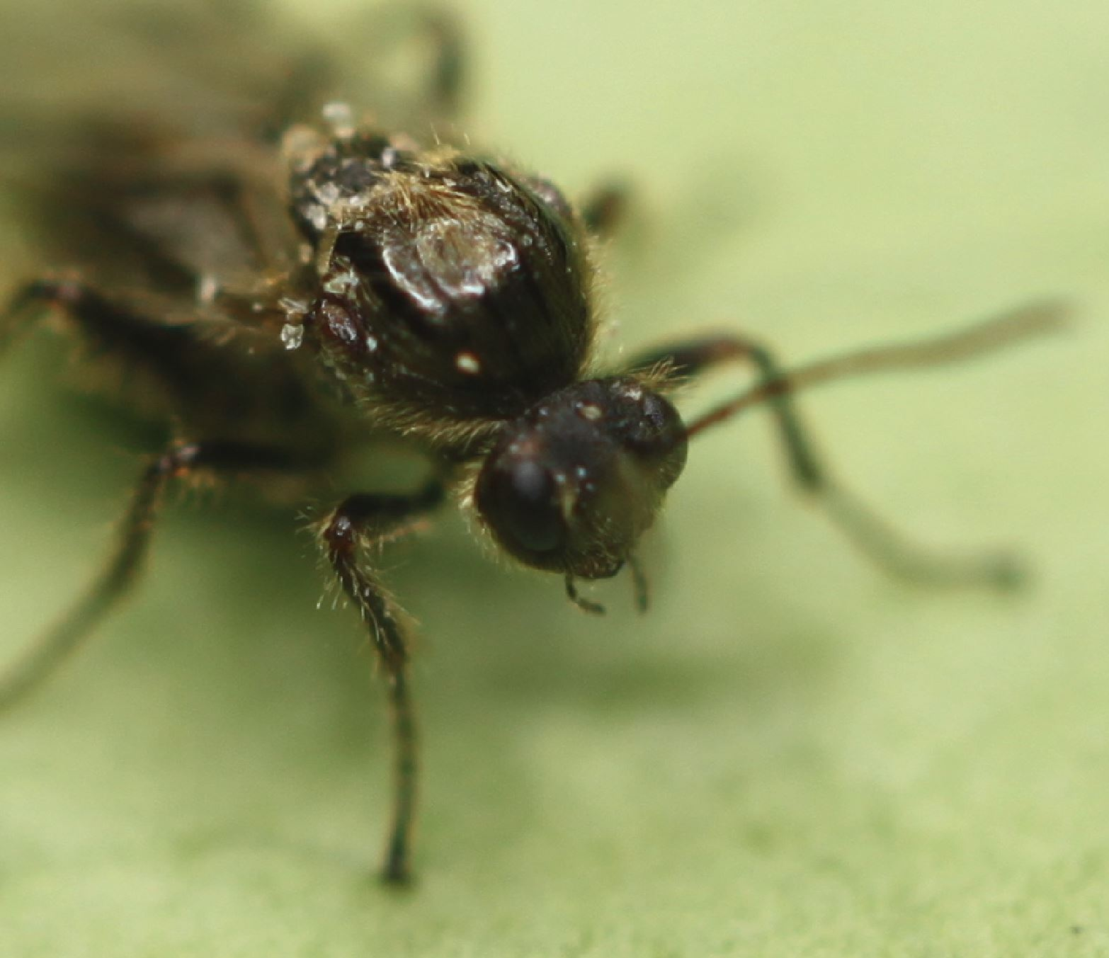 Gestreifte Eichengallwespe (Cynips longiventris); Kopf und Vorderleib der Wintergeneration